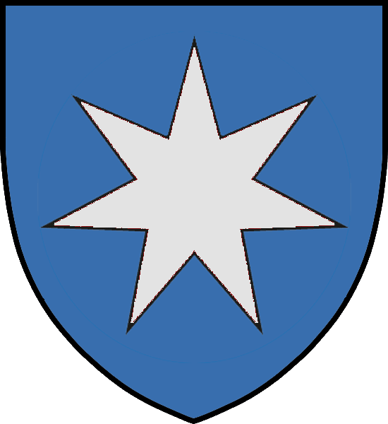 Vapensköld för Peter Finvidssons ätt